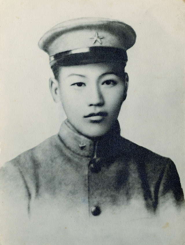 蒋中正留学日本时的照片。版权保护条款已失去时效。Bân-lâm-gú: Tsiúnn Tiong-tsìng liû-ha̍k Ji̍t-pún sî ê siōng-phìnn. 蔣中正留學日本時的相片。